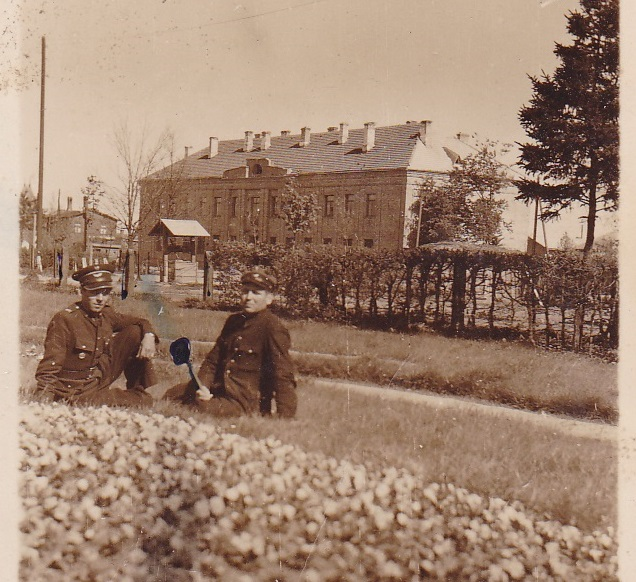 W 1940 roku Armia Czerwona wybudowała w Szepietowie miasteczko, składające się z około 30 budynków w większości bloków piętrowych z przeznaczeniem dla Wojsk Ochrony Pogranicza NKWD stacjonujących na „łuku białostockim”. Obecny budynek GS SCH wybudowano z przeznaczeniem na siedzibę dowództwa 88. oddziału.